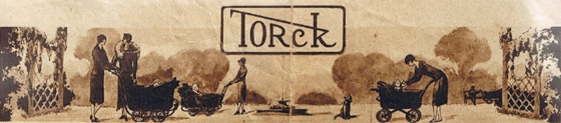 Reclame van Torck - Deinze - Oost-Vlaanderen - België